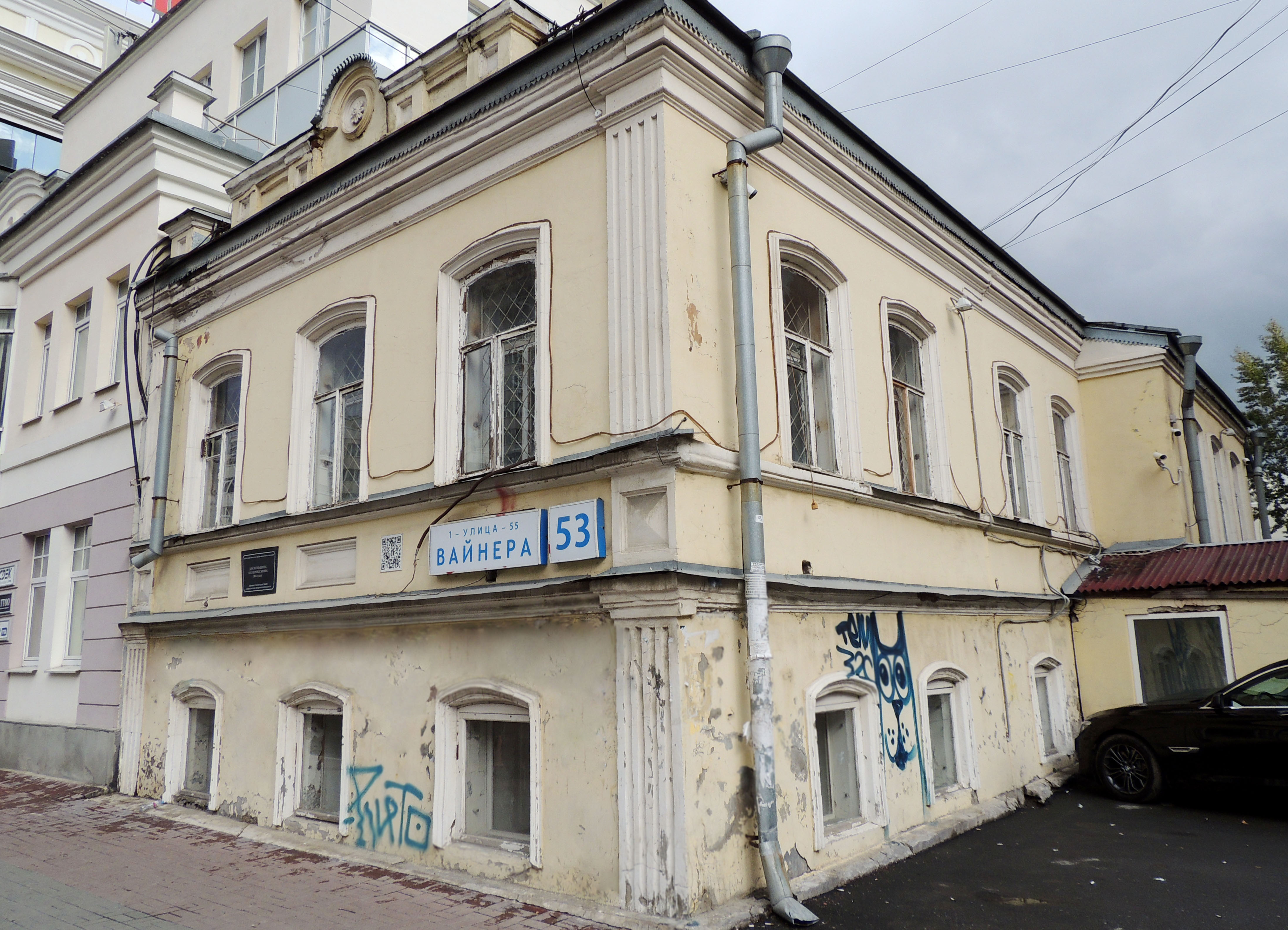 Дом, в котором жил видный революционер Н. Н. Замятин: улица Вайнера, 53, Екатеринбург, Свердловская область